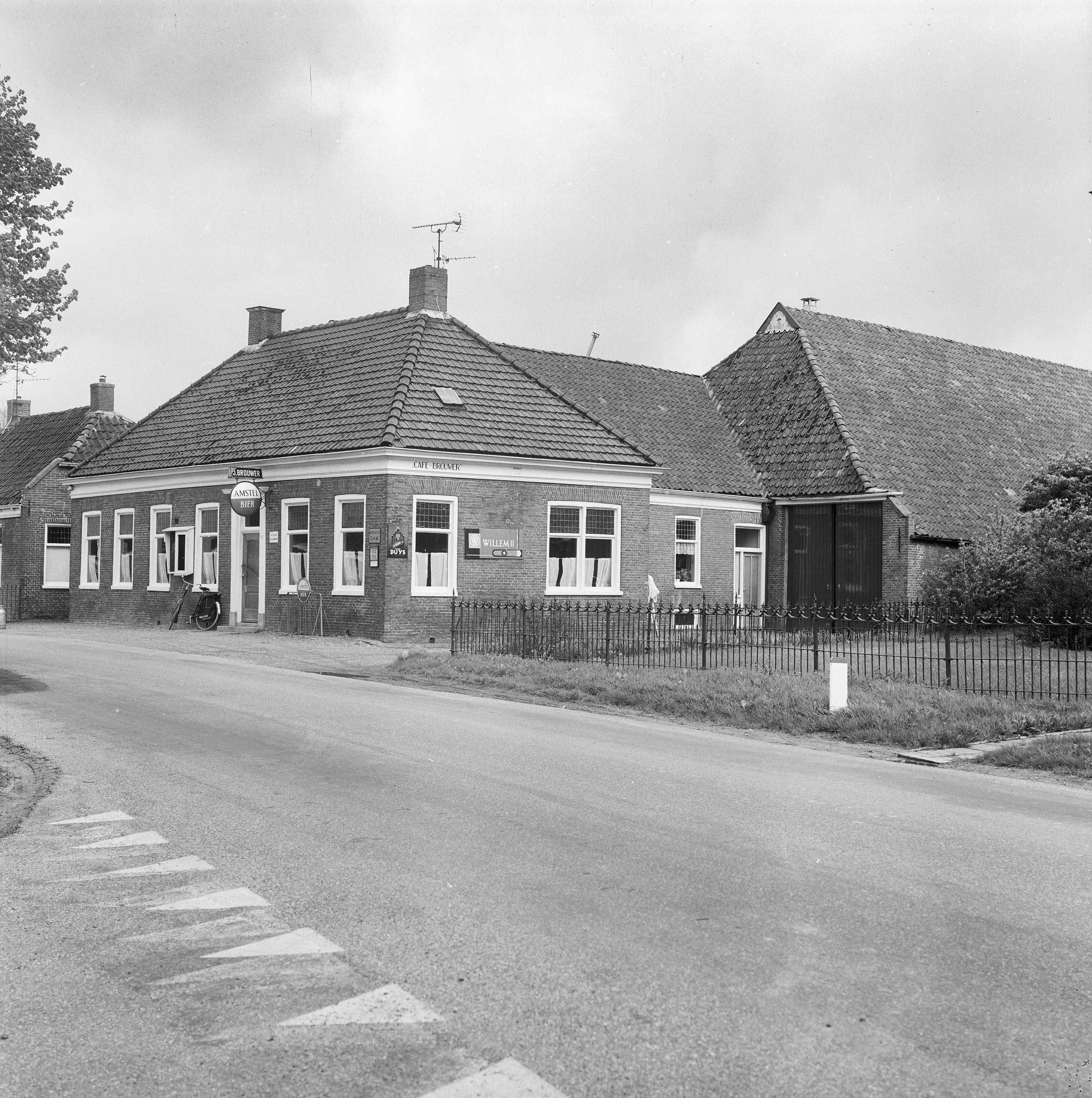 voor- en zijgevel voormalig café Oude Rechthuis.